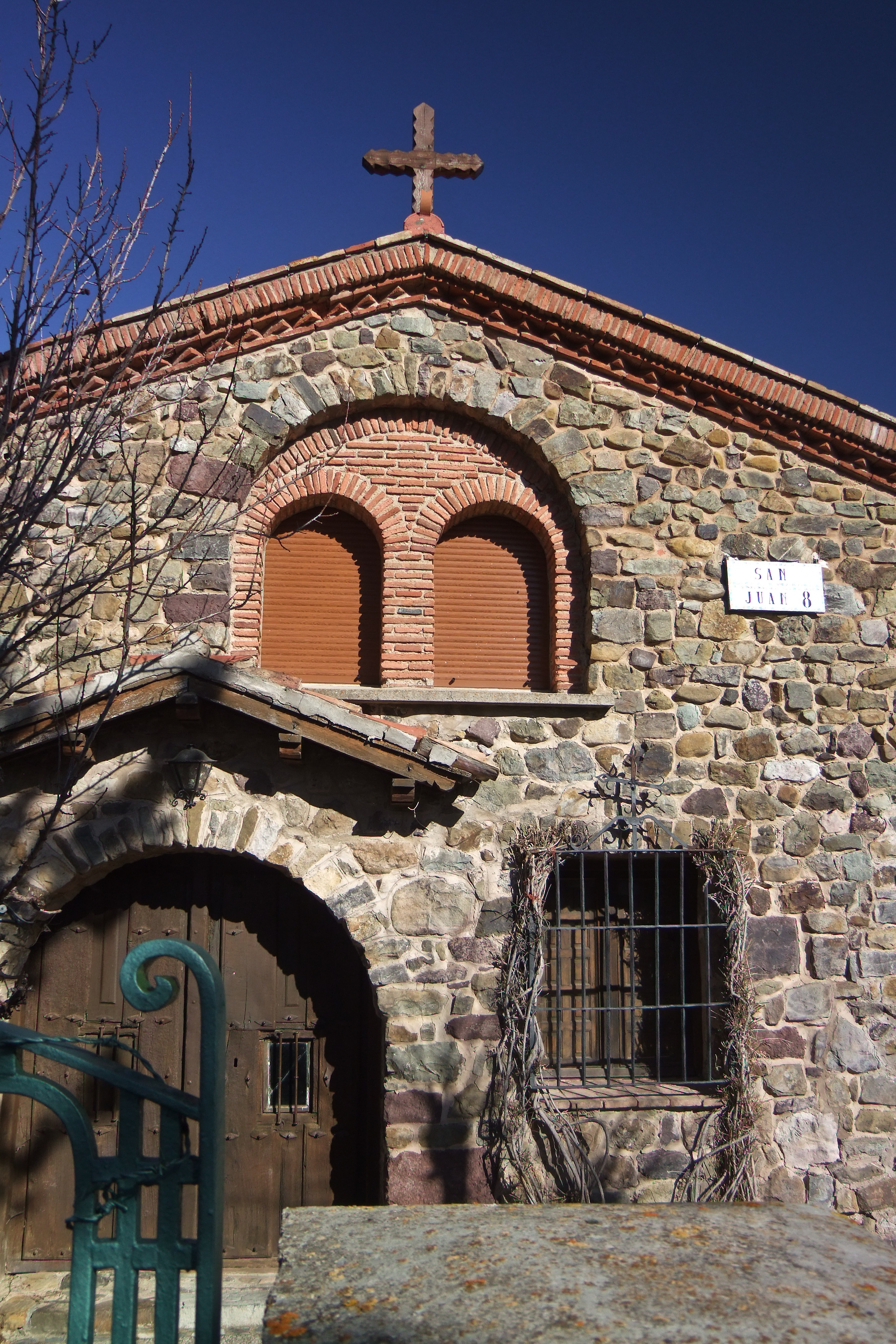 Ermita de San Juan en Laguna de Cameros, La Rioja - España